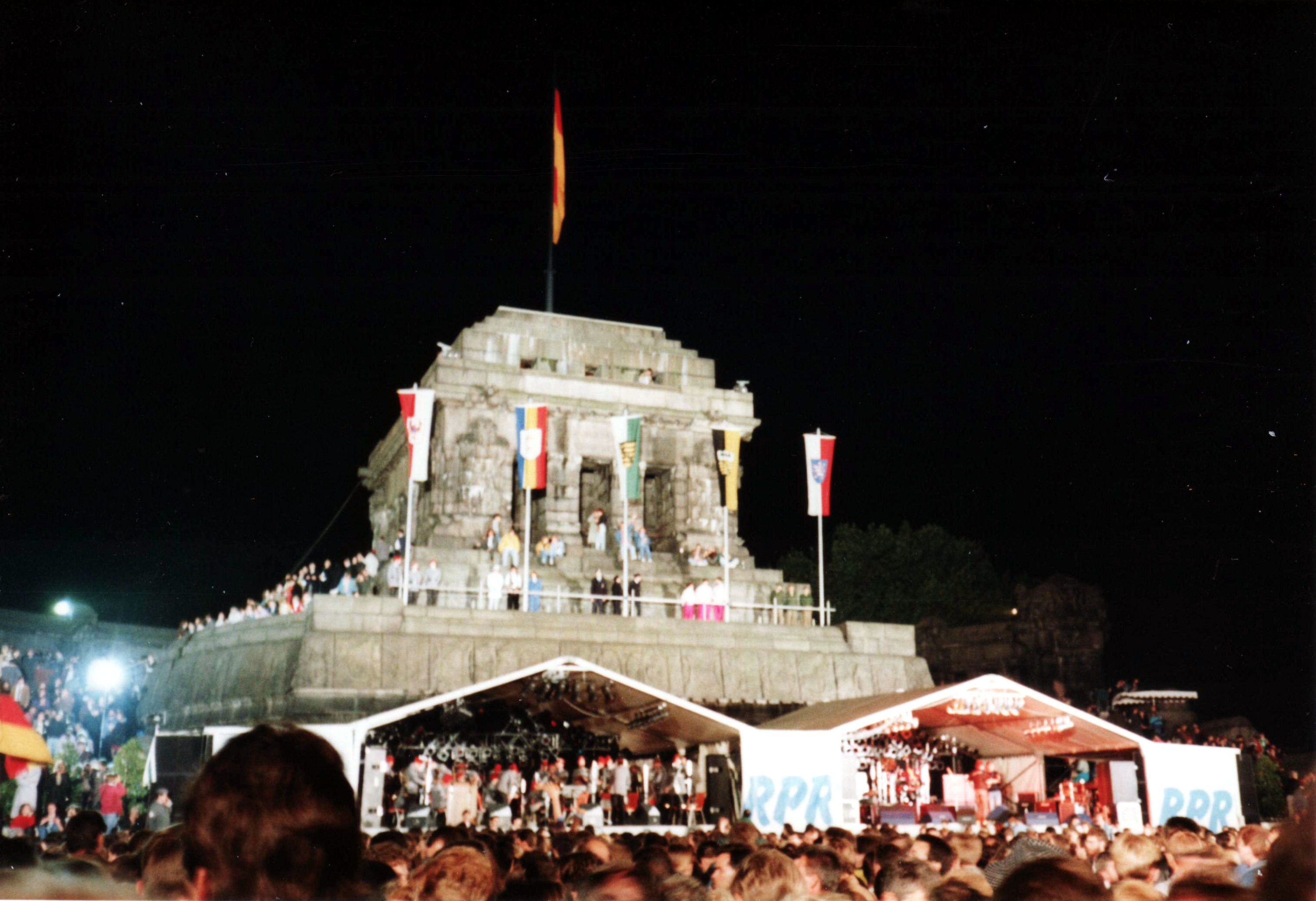 Feierlichkeiten zur Wiedervereinigung am Deutschen Eck in Koblenz